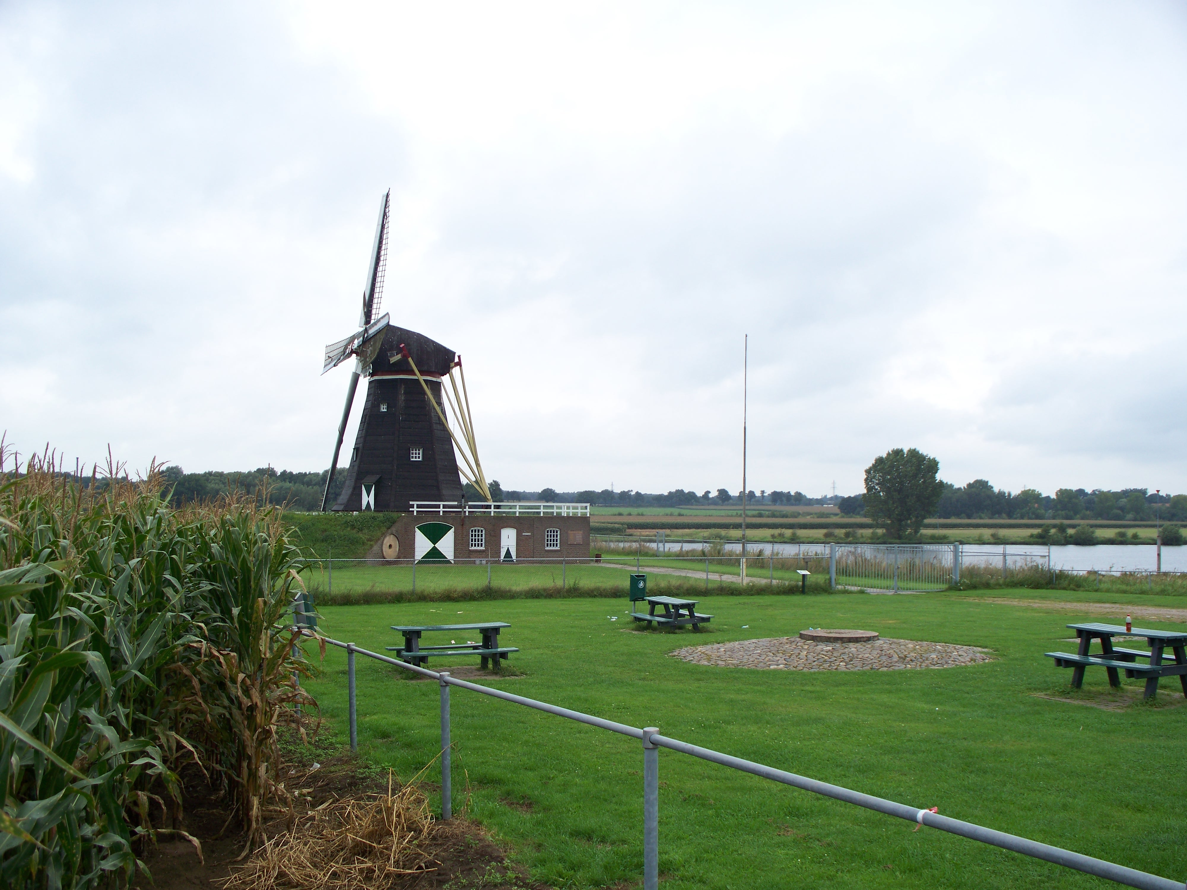 Windmolen de Grauwe Beer, Beesel, Ouddorp